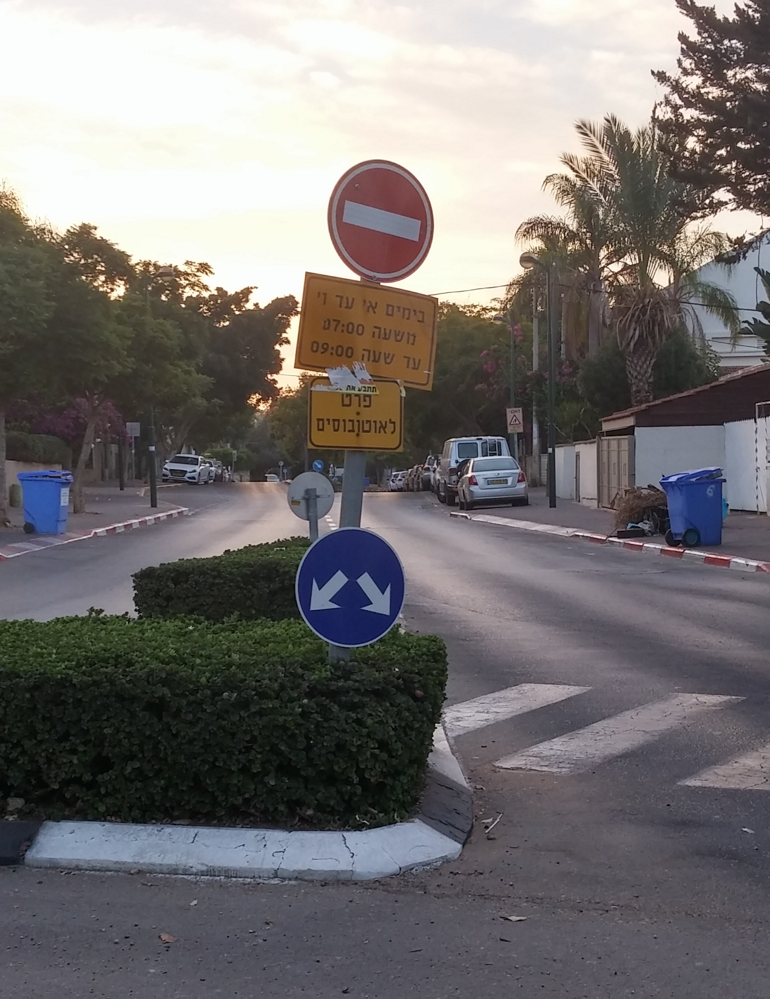 תמרור "אין כניסה" עם תוספות